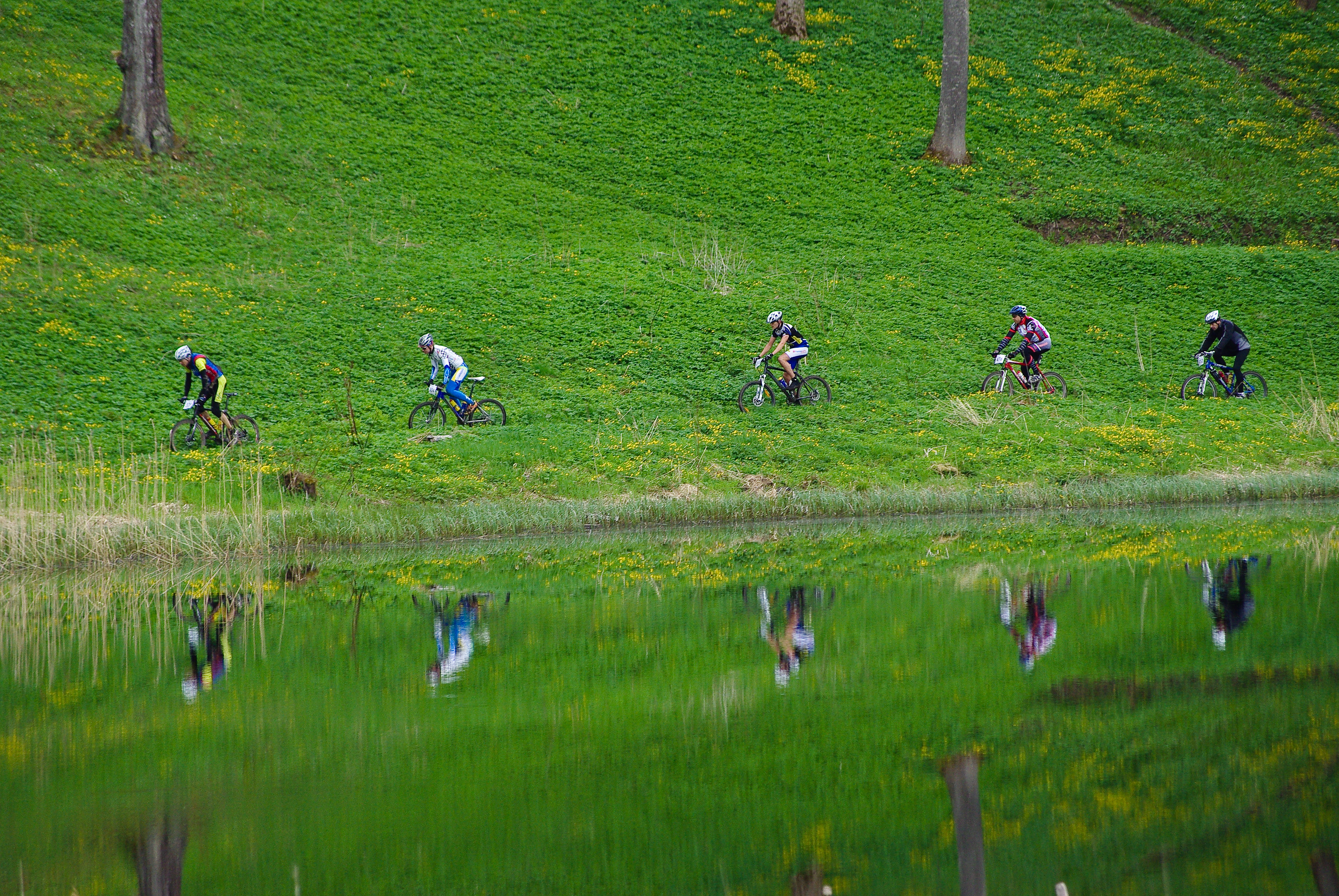 Rõuge Rattamaraton Ratasjärve kaldal